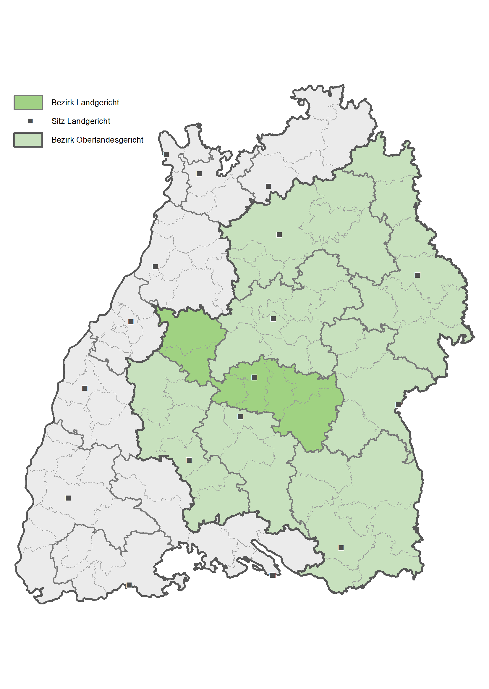 Karte des Bezirks des Landgerichts Tübingen in Baden-Württemberg